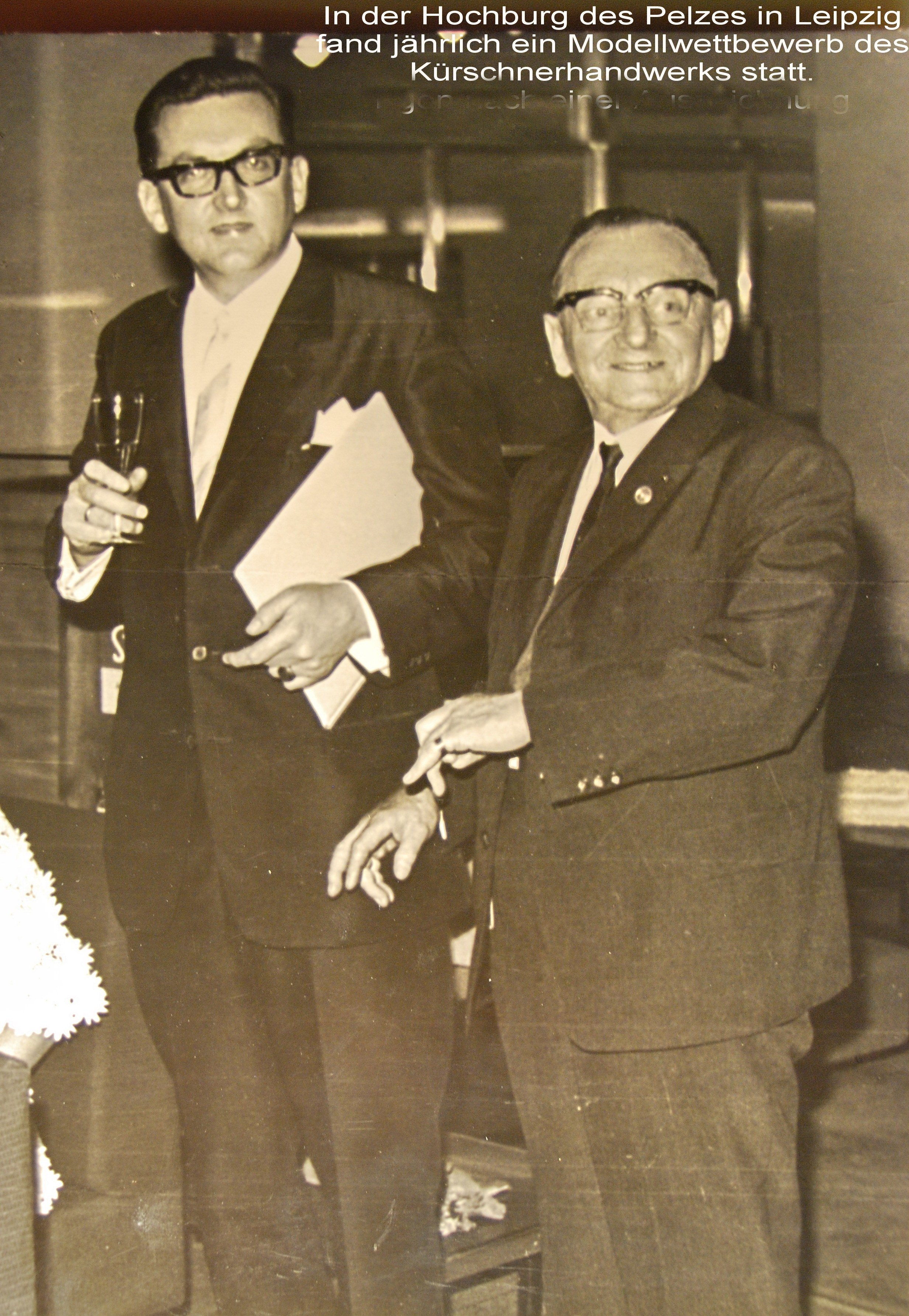 Bilder aus der Firmengeschichte der Kürschnerfamilie Toursel. Die Kürschnermeister Egon und Fritz Toursel beim Modellwettbewerb des Kürschnerhandwerks der DDR, anlässlich einer Auszeichnung.